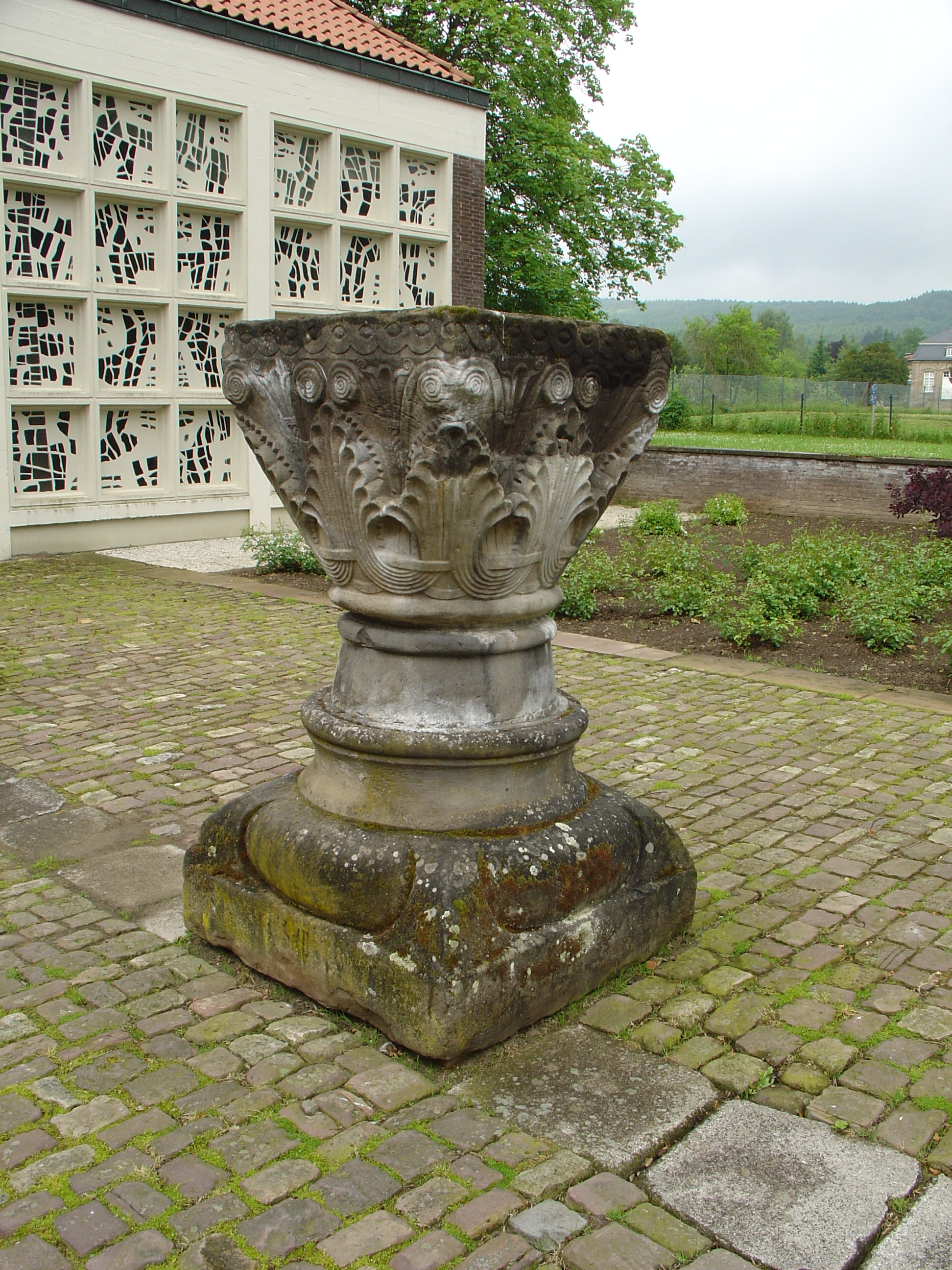 Basis und Kapitell einer Säule der 1812 abgerissenen Klosterkirche Hardehausen